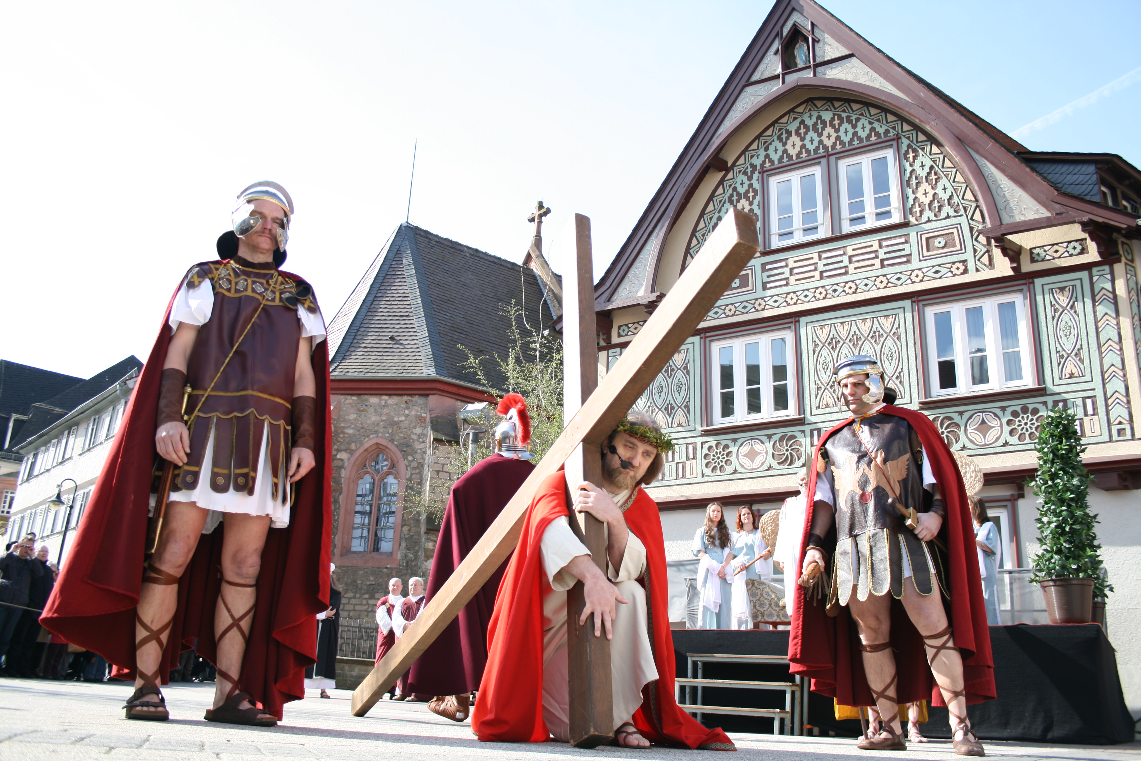 Kreuzaufnahme Bensheimer Passionsspiel 2010